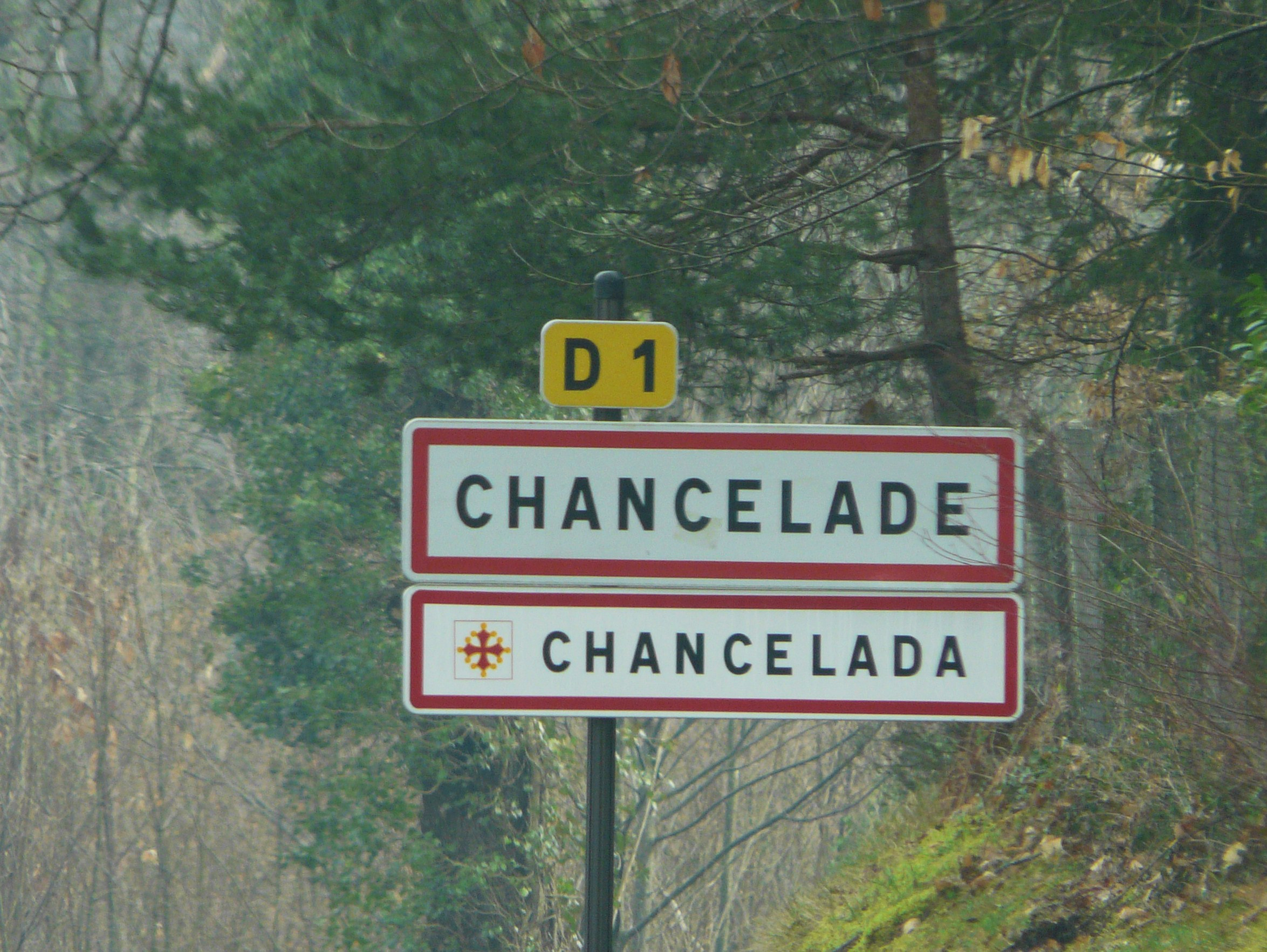 Panneau d'entrée à Chancelade, Dordogne, France.